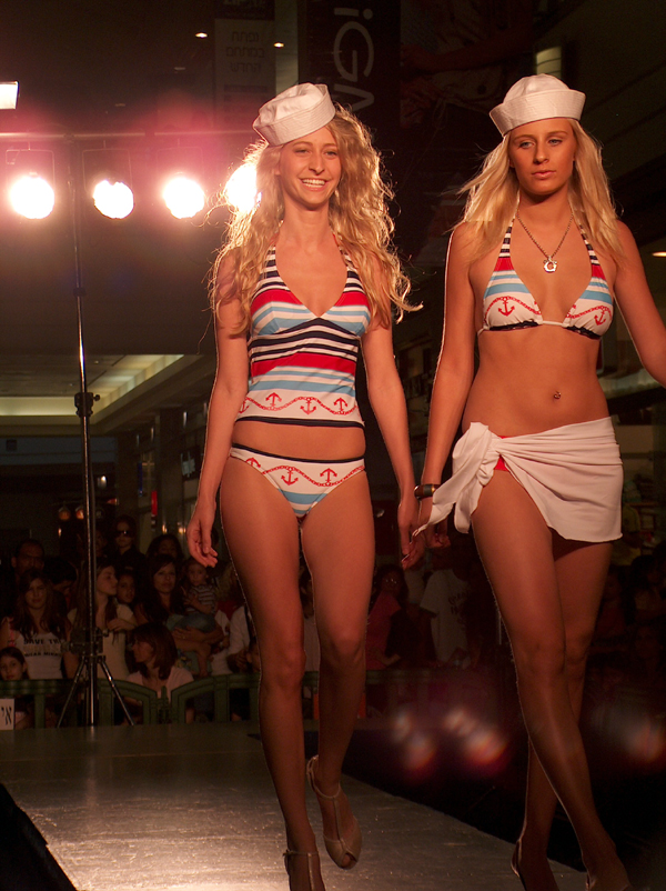 תצוגת אופנה בקניון הגדול בפתח תקווה בהשתתפותן של כוכבות סדרת הדוגמניות, בצילום: כריסטין ומישל. (22/5/2006) צילום: מיכאלי 19:43, 22 מאי 2006 (IDT)